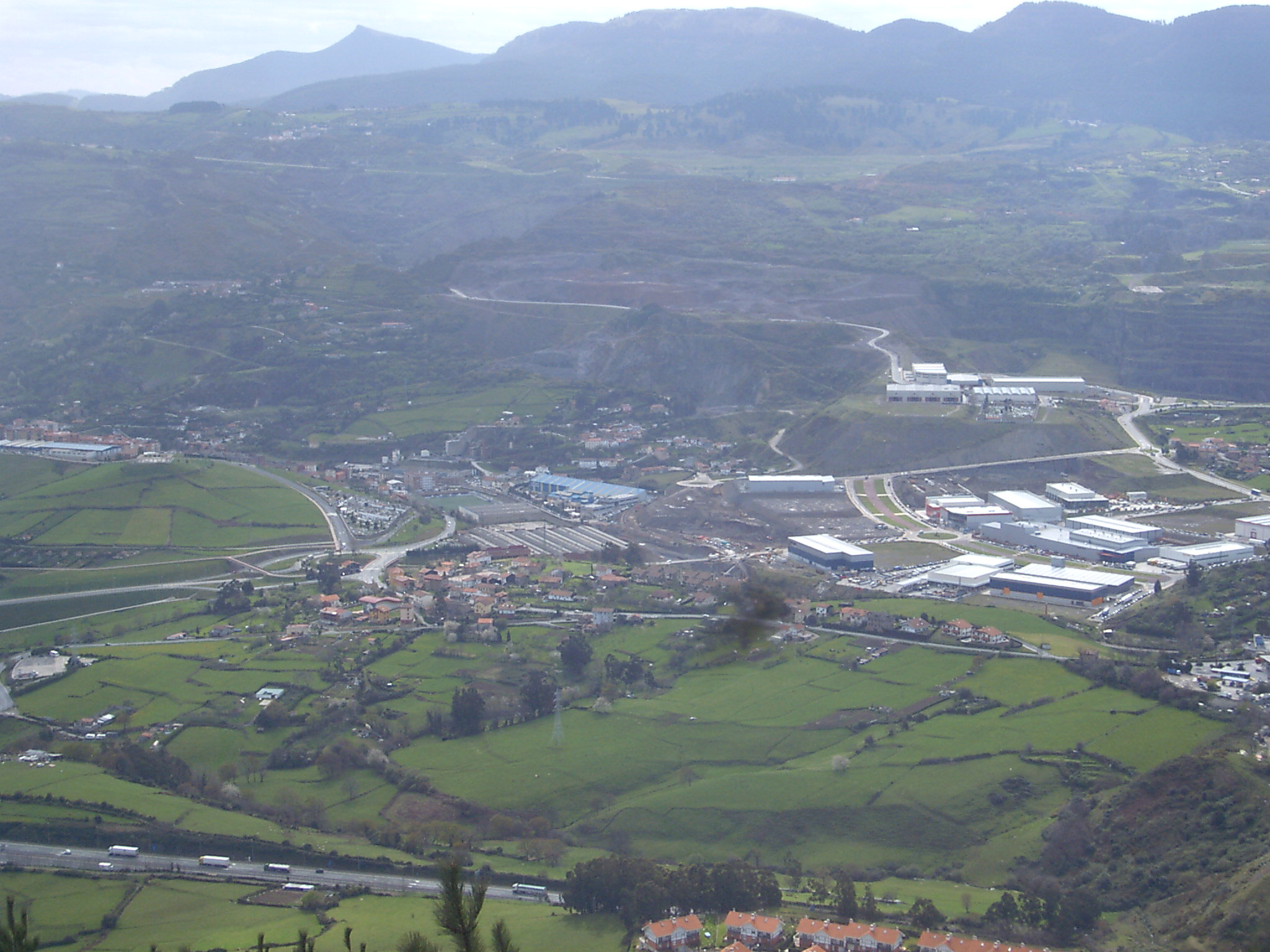 Ortuella Serantes menditik